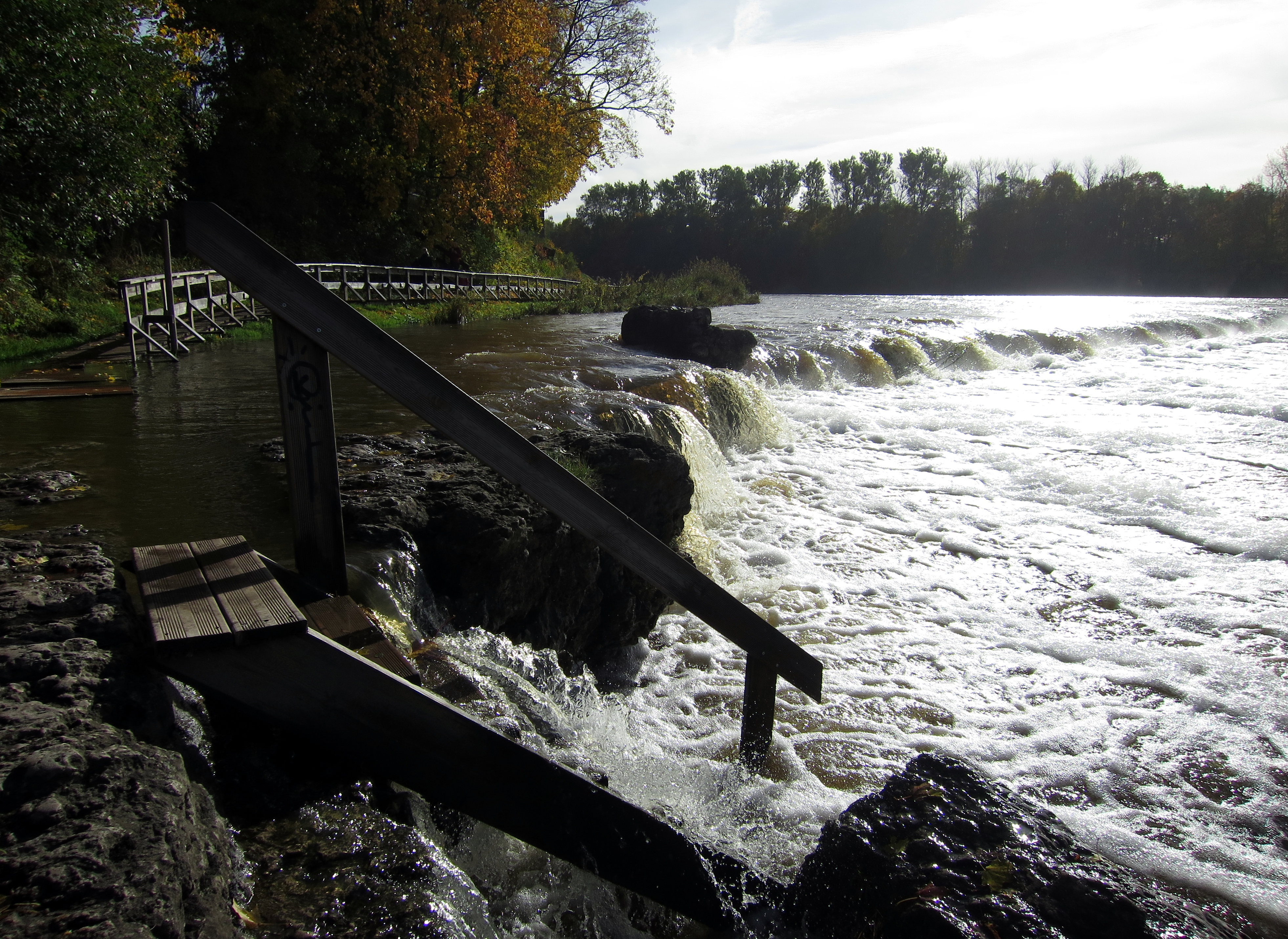 Ventas rumba pēc 2017. gada oktobra lietavām